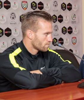 Carando Al Fujairah